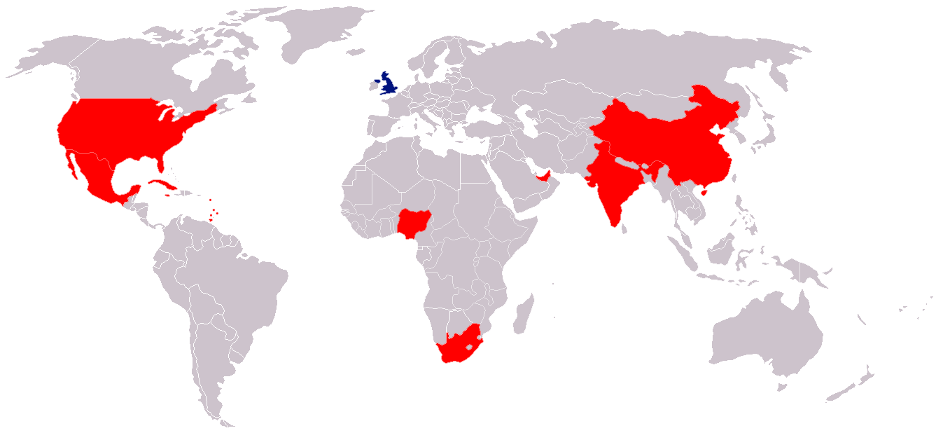 Karte mit Zielen der Virgin Atlantic